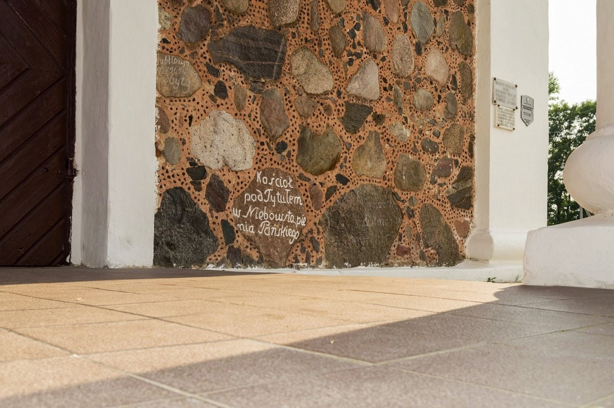 Дзеркаўшчына. Касцёл